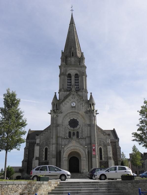 Façade occidentale de l'église Saint-Maimbœuf du Theil-de-Bretagne (35).